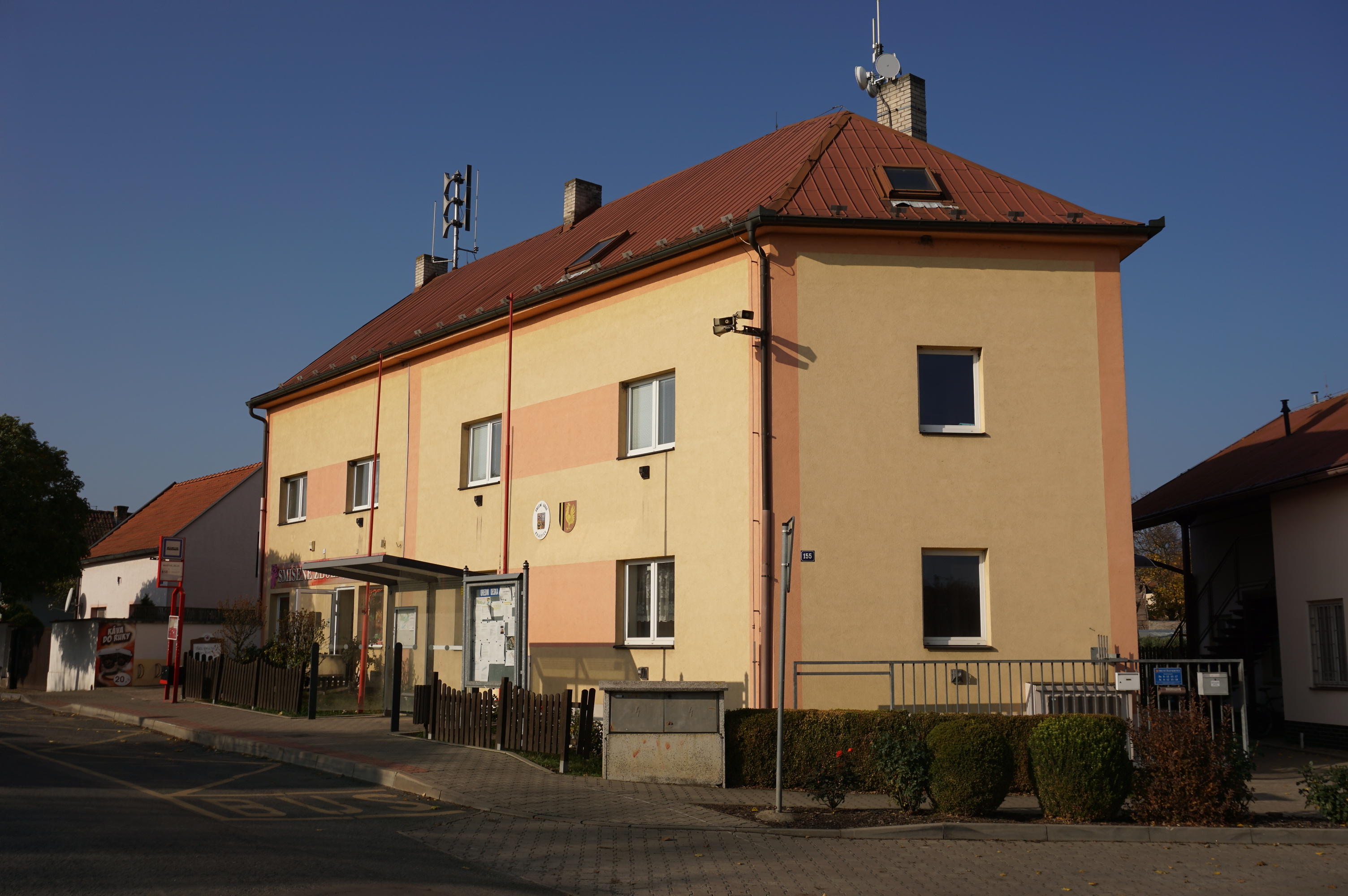 Kojetice (u Prahy) - obecní úřad (ul. Lipová 155)